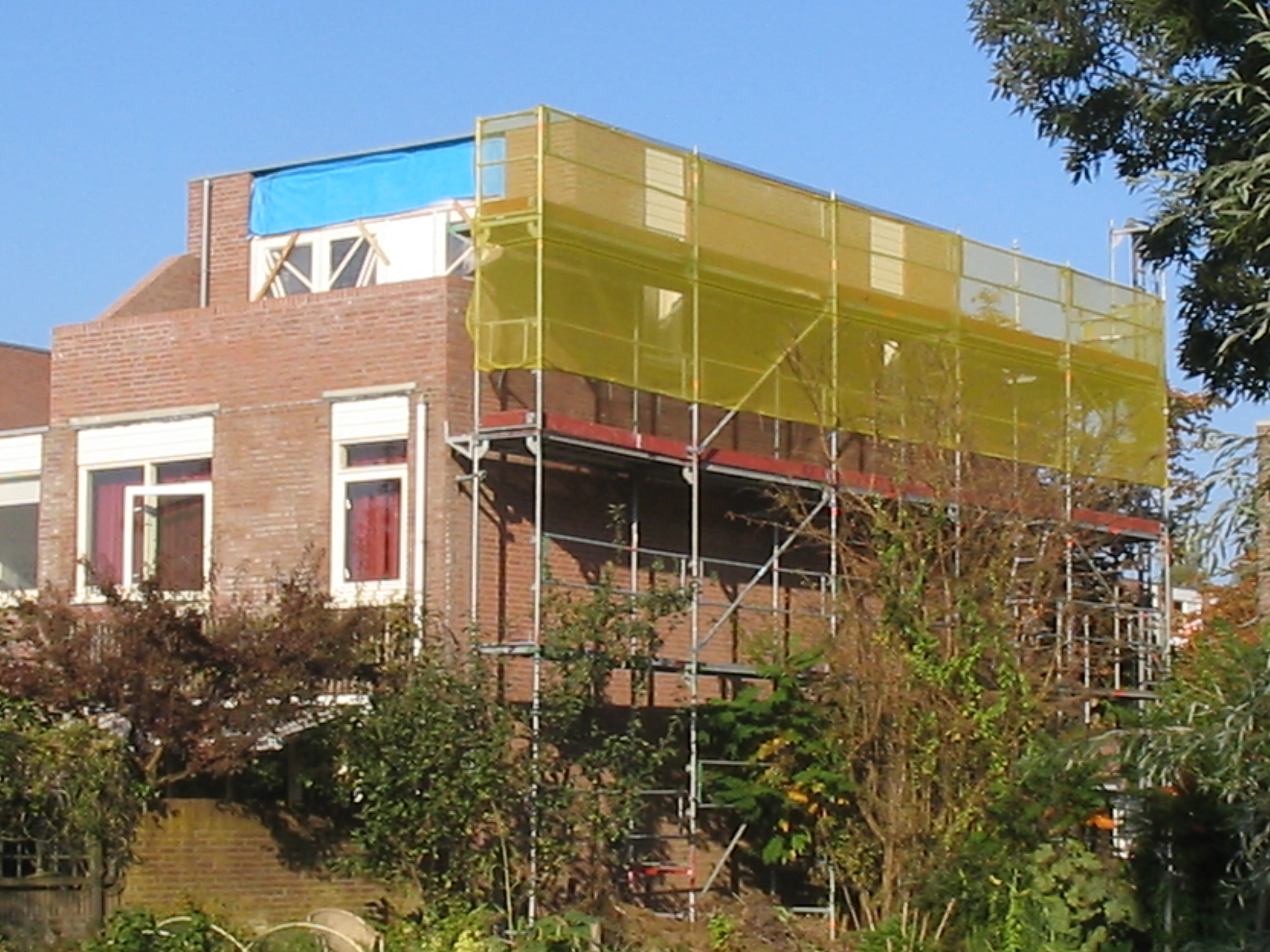 bouwsteiger gebruikt voor de opbouw van een woning, delft, 16 oktober 2005